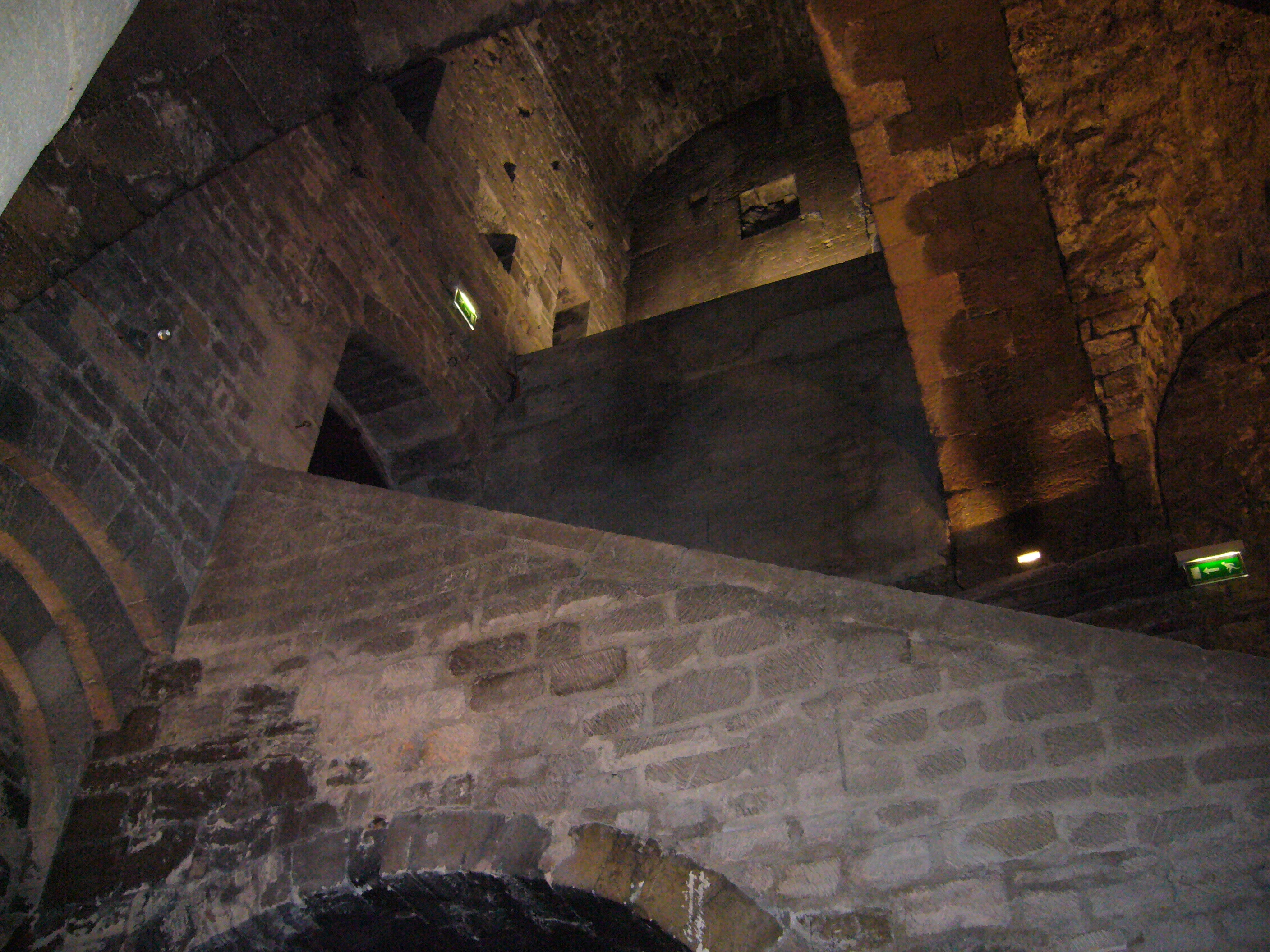 Vue vers le haut de la crypte de l’Abbaye Saint Victor à Marseille.